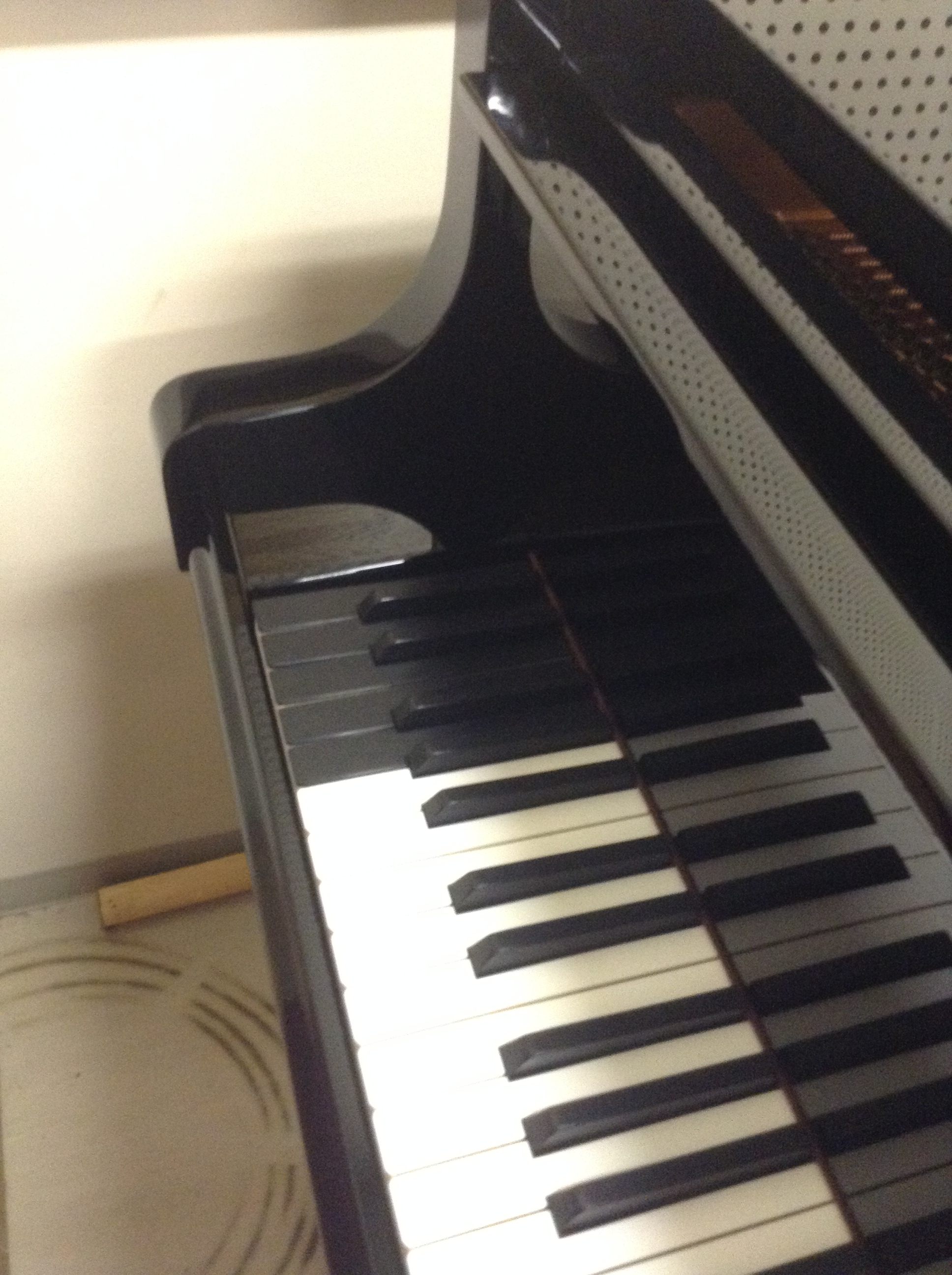 ベーゼンドルファー モデル290の低音部。一般のピアノにない9つの鍵は黒色に塗られている。横浜みなとみらいホールのもの。